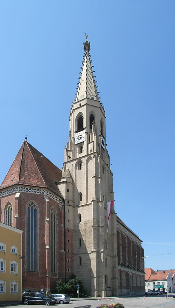 Pfarrkirche St. Nikolaus in Neuötting